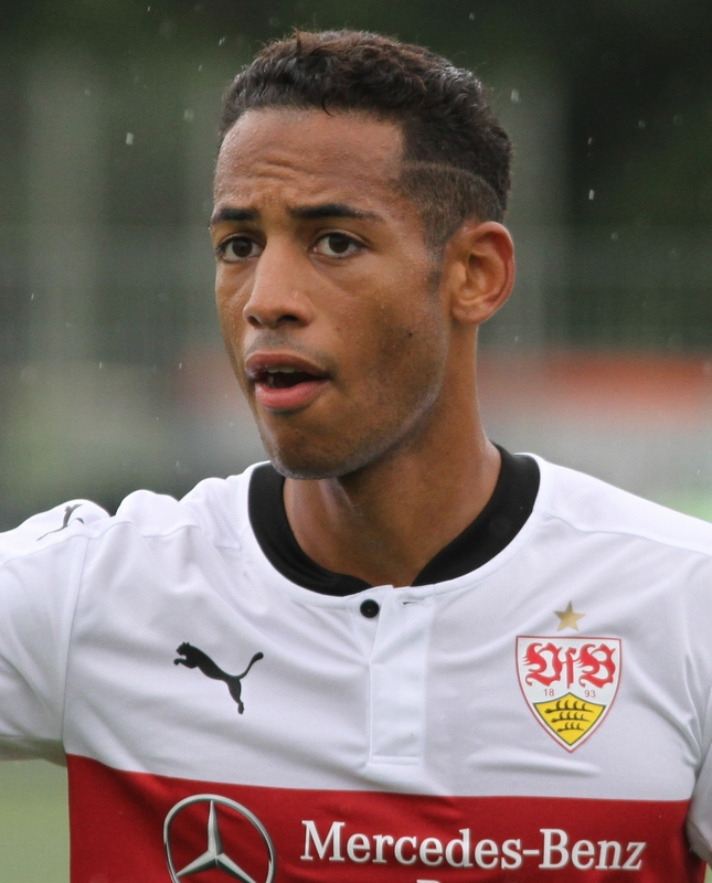 Dennis Aogo beim Testspiel gegen Ingolstadt im Regen. Aufgenommen von